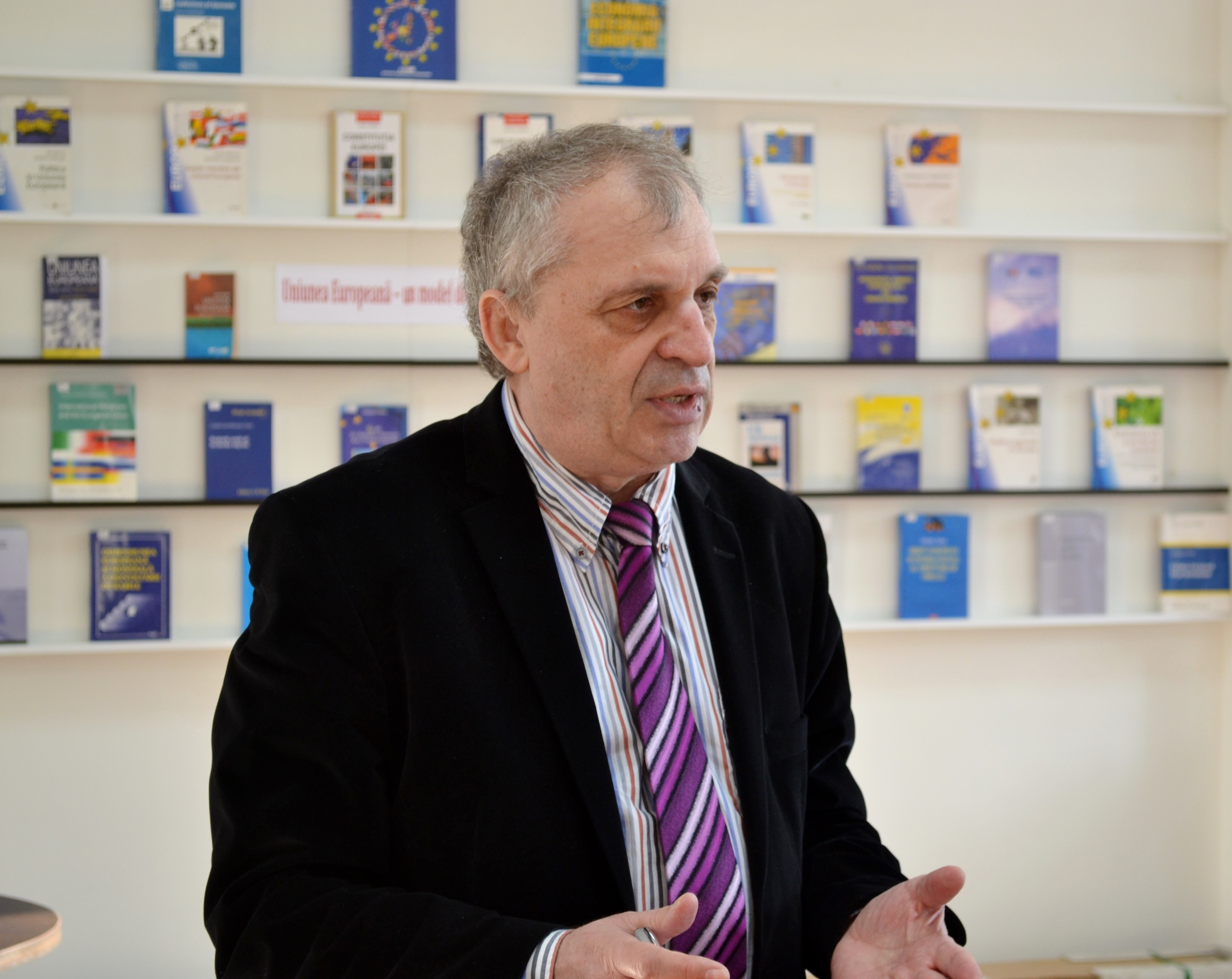 Discuție/dezbatere „Summit-ul de la Vilnius - moment crucial pentru destinul Republicii Moldova”. Întâlnire cu invitatul Petru Bogatu, profesor universitar, jurnalist şi analist politic. Participanți: Batalionul nr. 1 al Unității Militare 1002 a trupelor de carabinieri (comandanți: locotenent-colonel Viorel Șcerbina și locotenent major Anton Sochircă). Biblioteca Centrală, 13.10.2013.